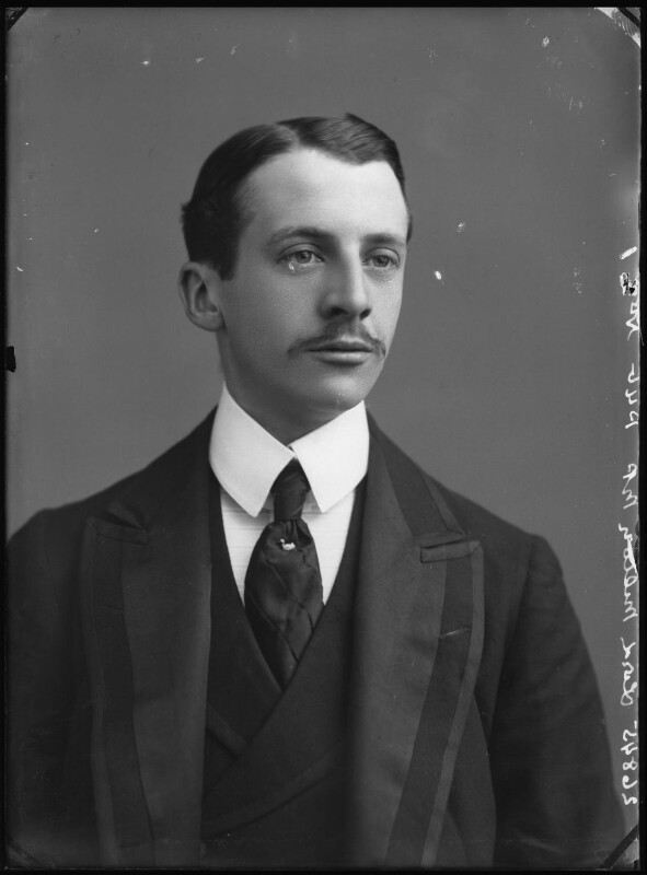 Lord Fitzwilliam